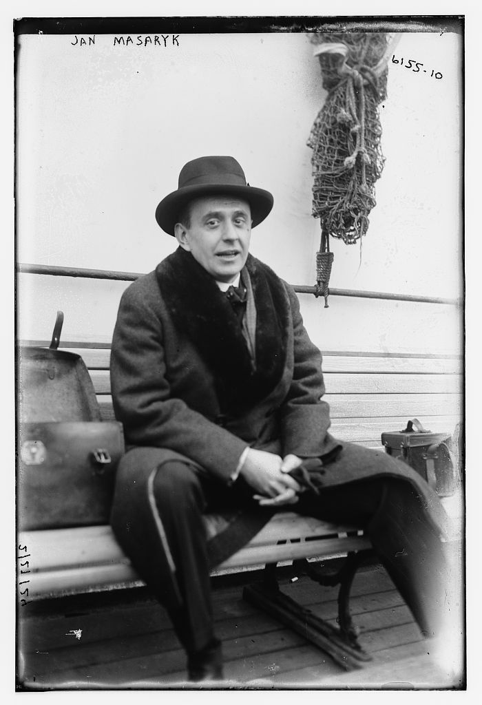 Retrato del político checoslovaco Jan Masaryk.